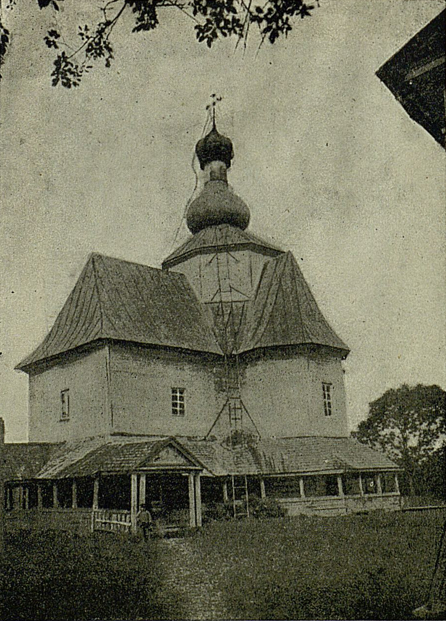 Беларуская (тарашкевіца): Красны (Krasny). Царква Прачыстай Багародзіцы, выкананая ў стылі традыцыйнай беларускай драўлянай архітэктуры з элемэнтамі стылю барока